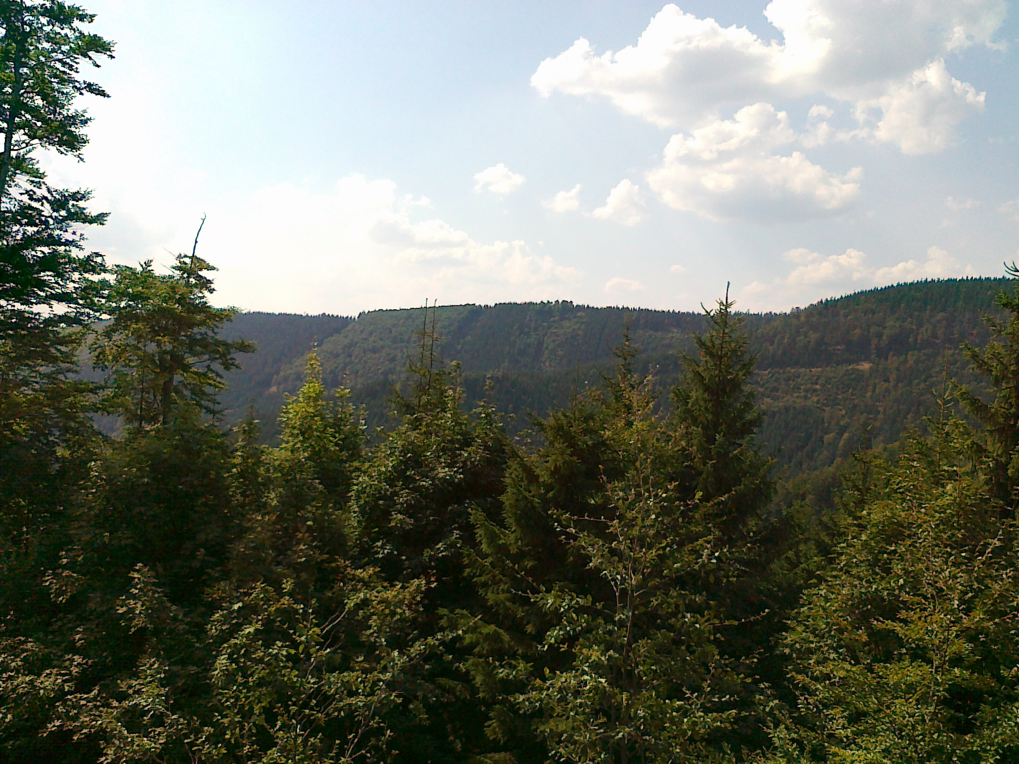 Widok z drogi nr 44 na szczyt Šindelná hora-JZ - 1058 m n.p.m.